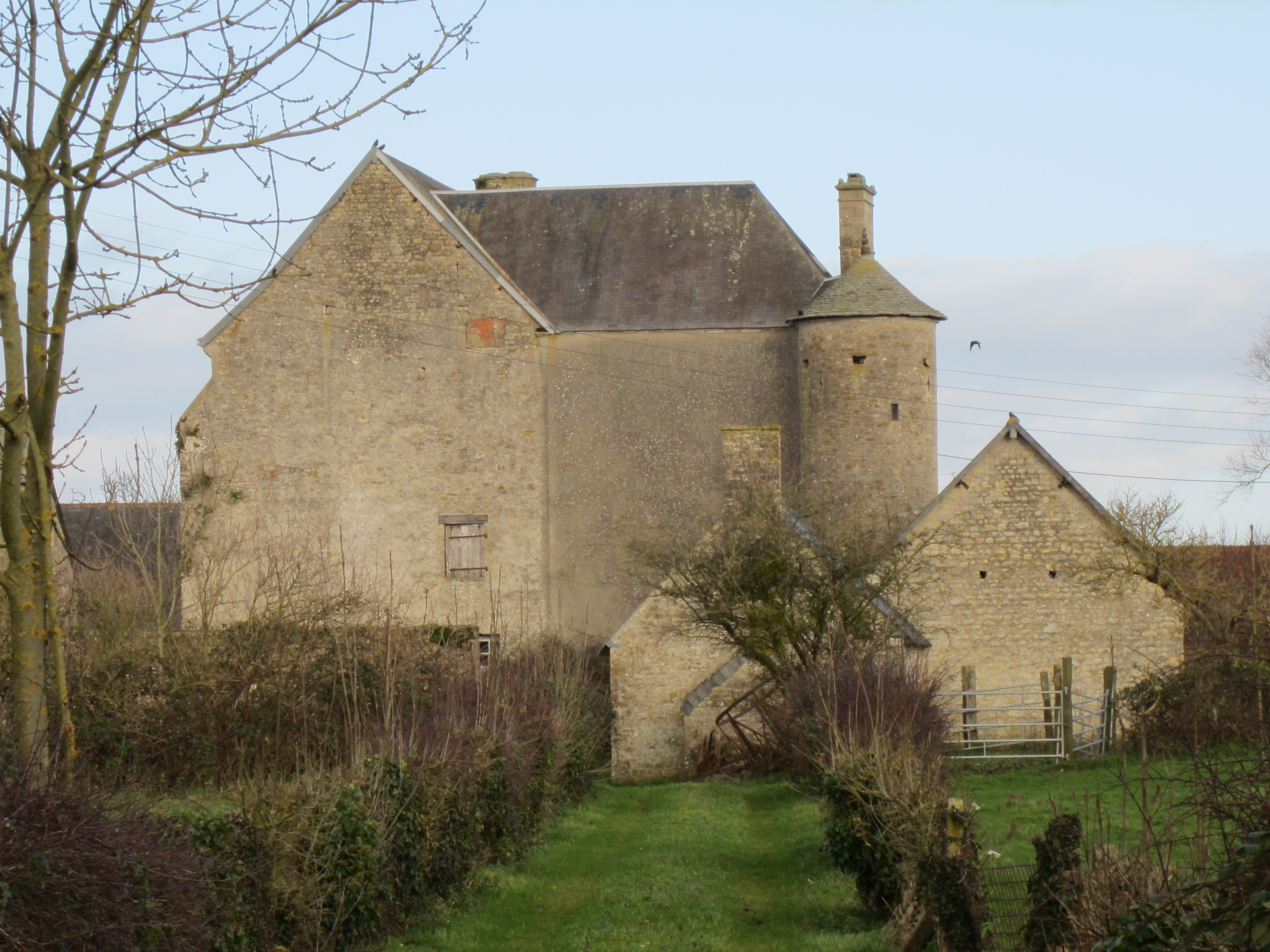 Manoir de Mariéville, Beuzeville-au-Plain